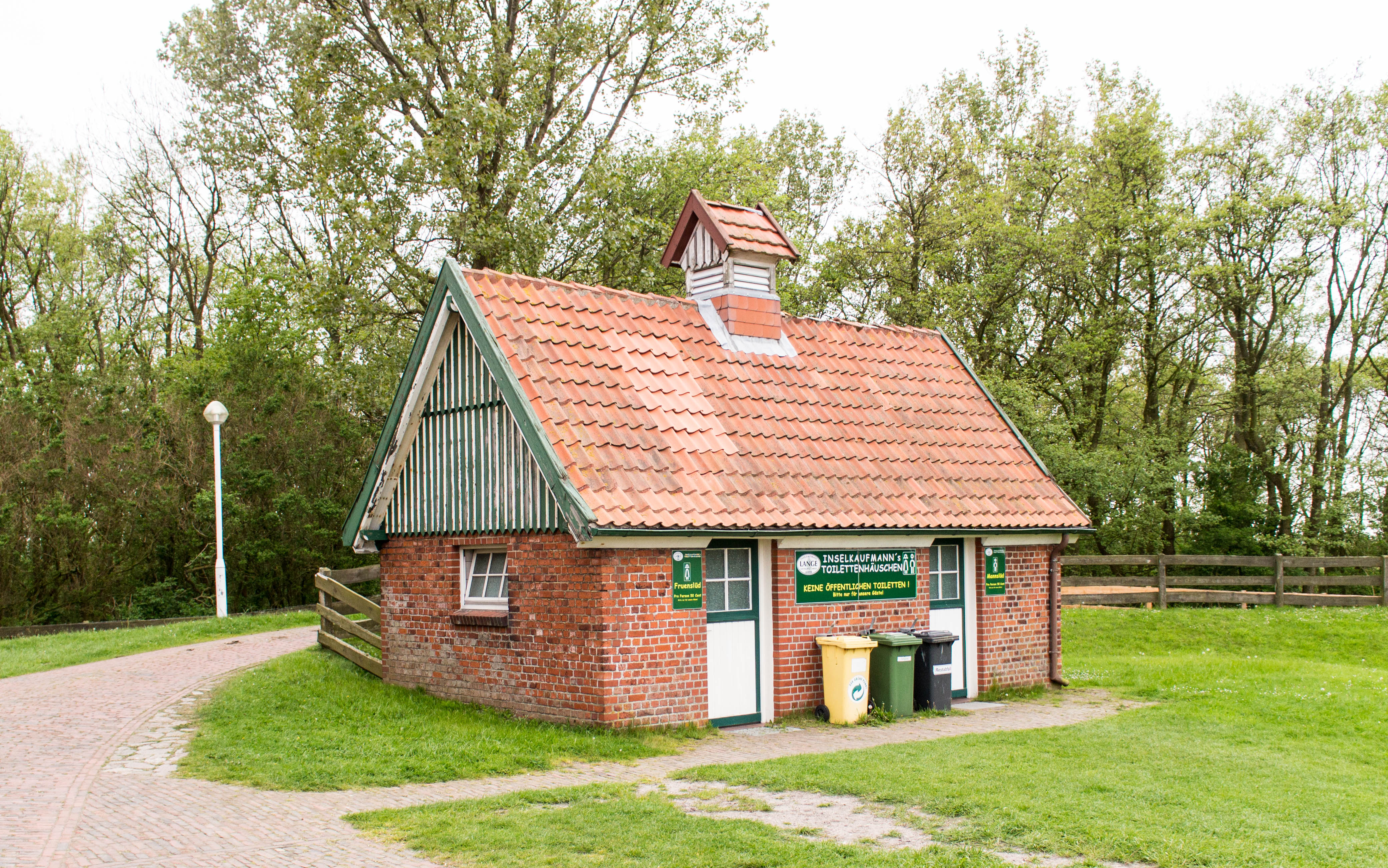 Ehemaliges Schul- und Bethaus in der Neuwerker Turmwurt